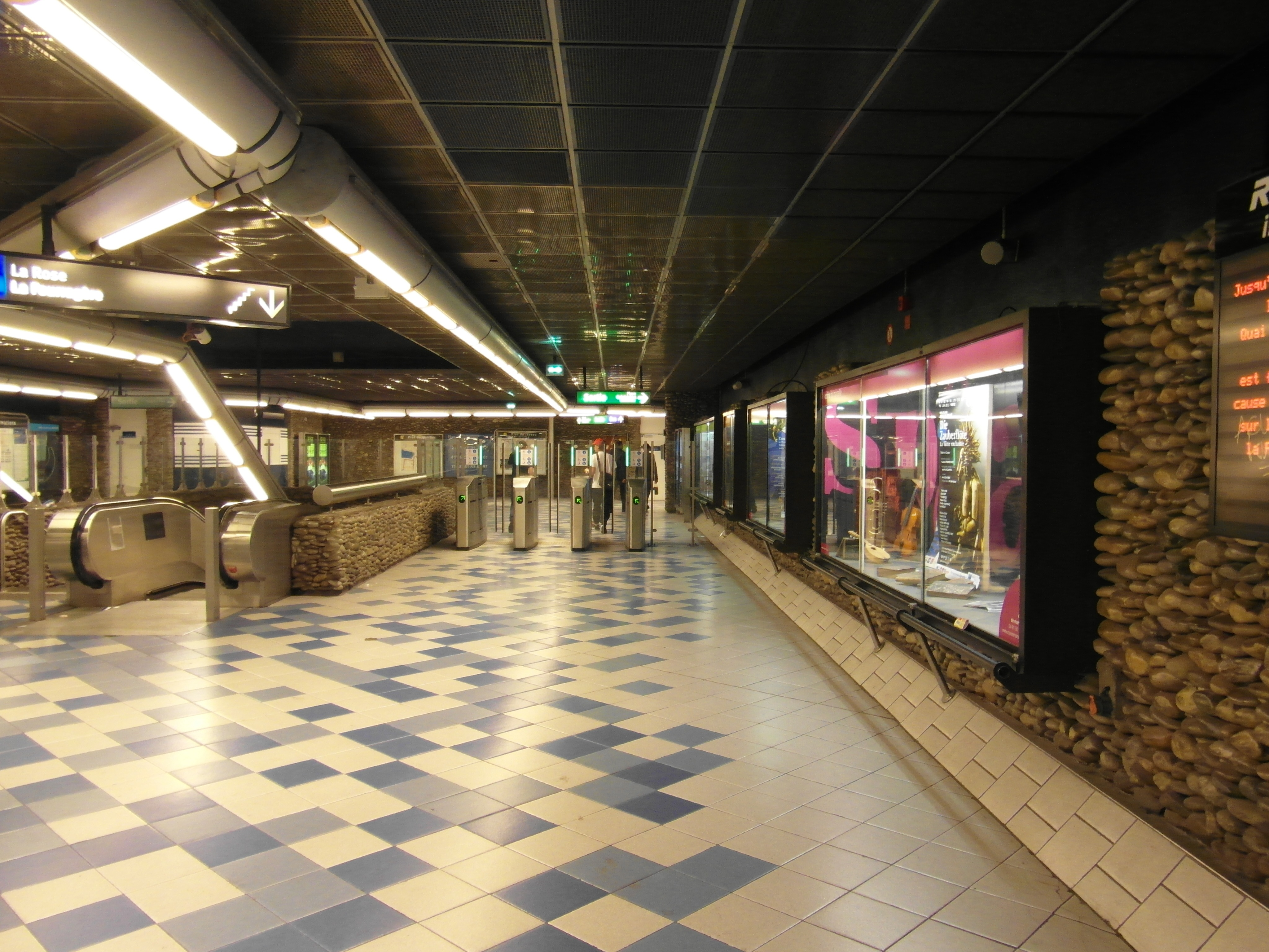 Marseille - Métro - Vieux-Port